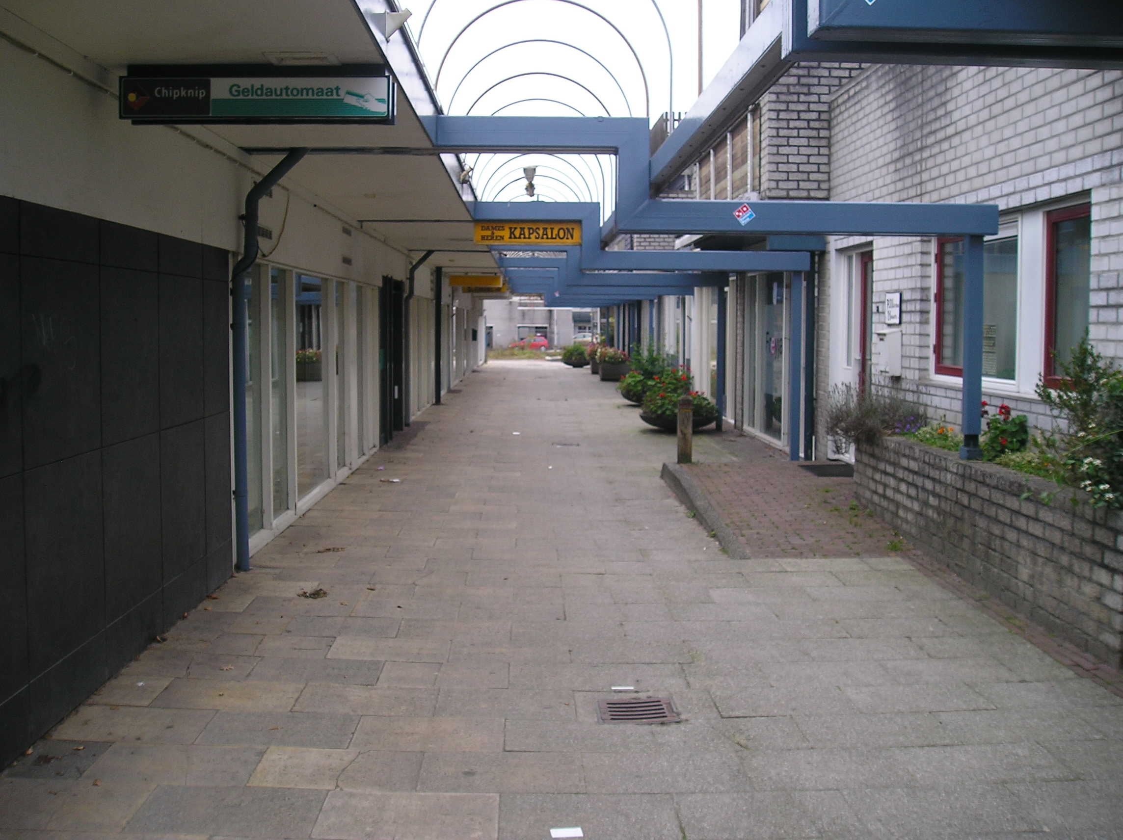 Uitzicht vanaf de kant van Hortentia State